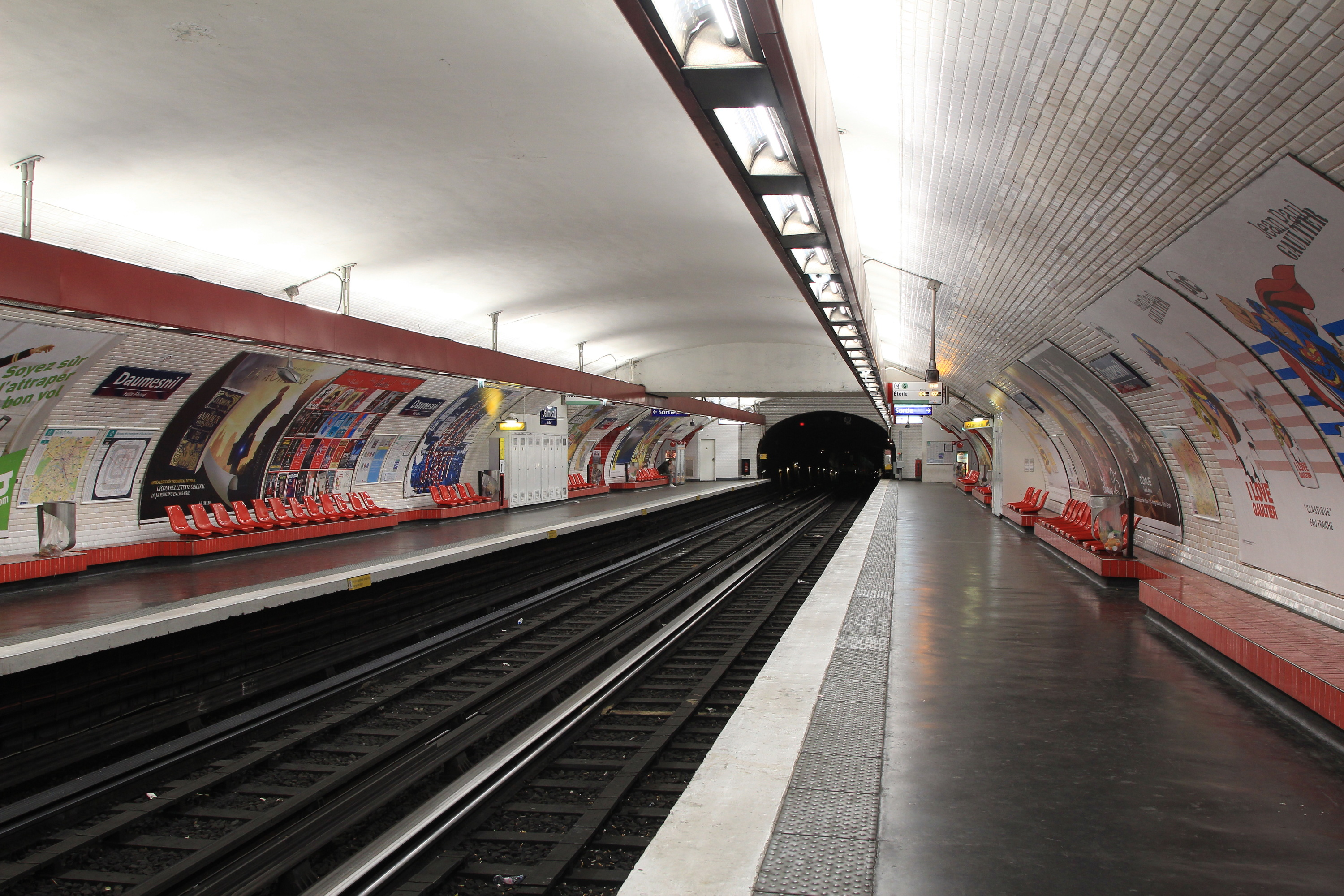 Quais de la station Daumesnil sur la ligne 6 du métro de Paris, vue en direction d'Étoile.